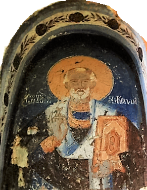 Фреска над влезот во црквата „Св. Никола“ во битолско Стрежево